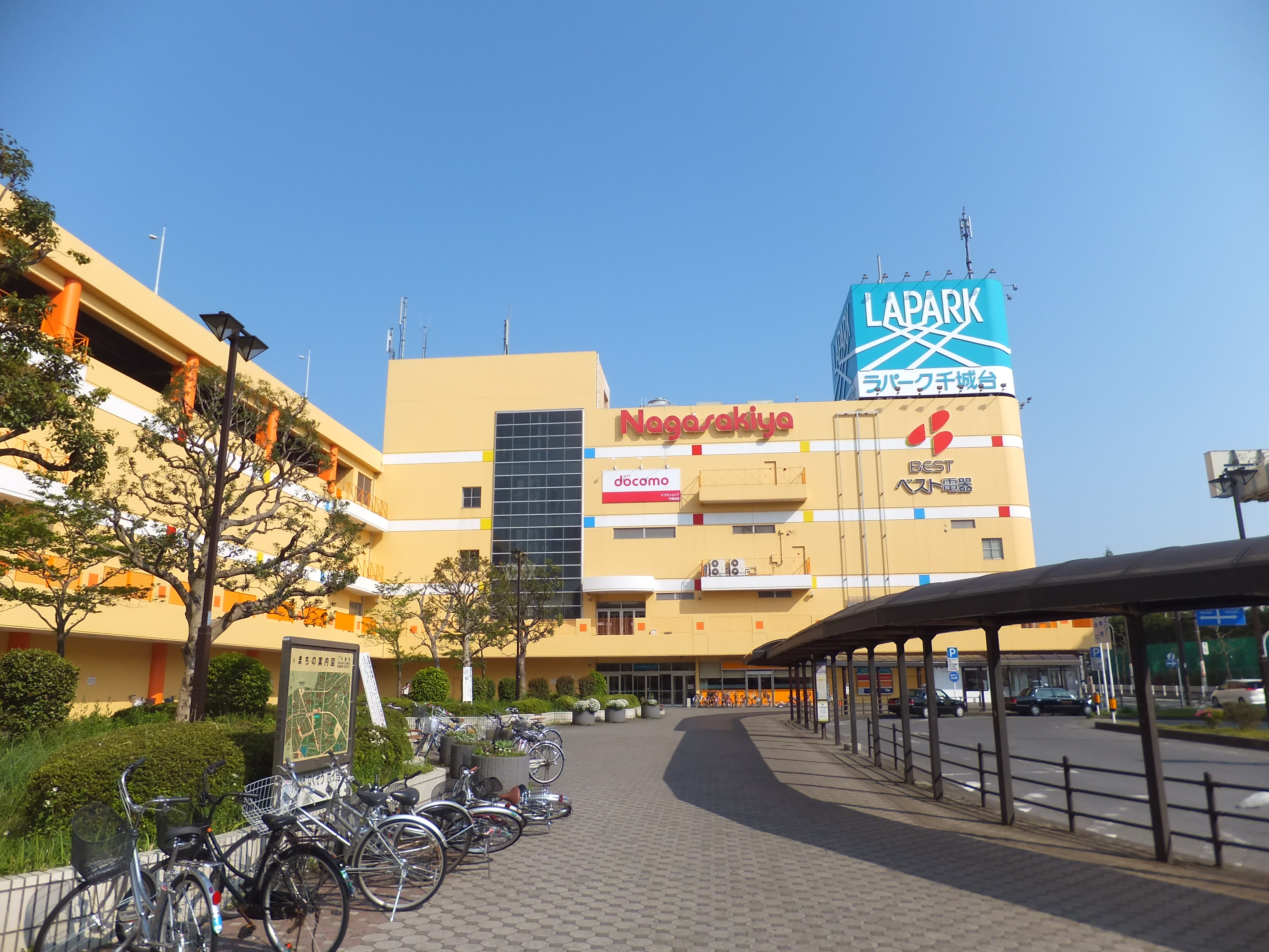 ラパーク千城台（千城台駅に隣接したショッピングモール）